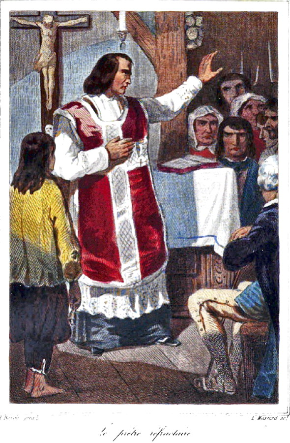 Un prêtre officiant clandestinement sous la Terreur et des fidèles